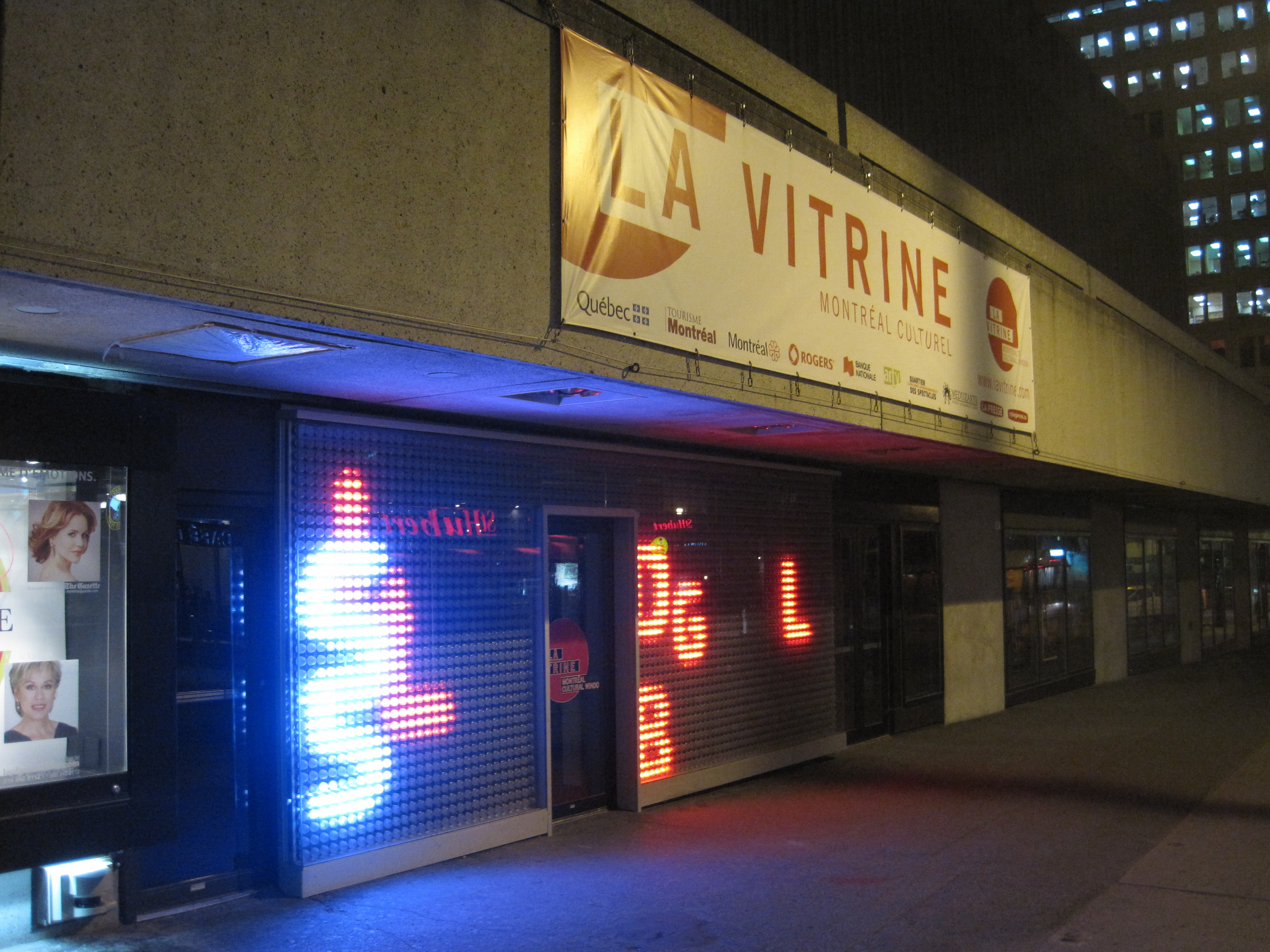 Extérieur de la Vitrine culturelle de Montréal